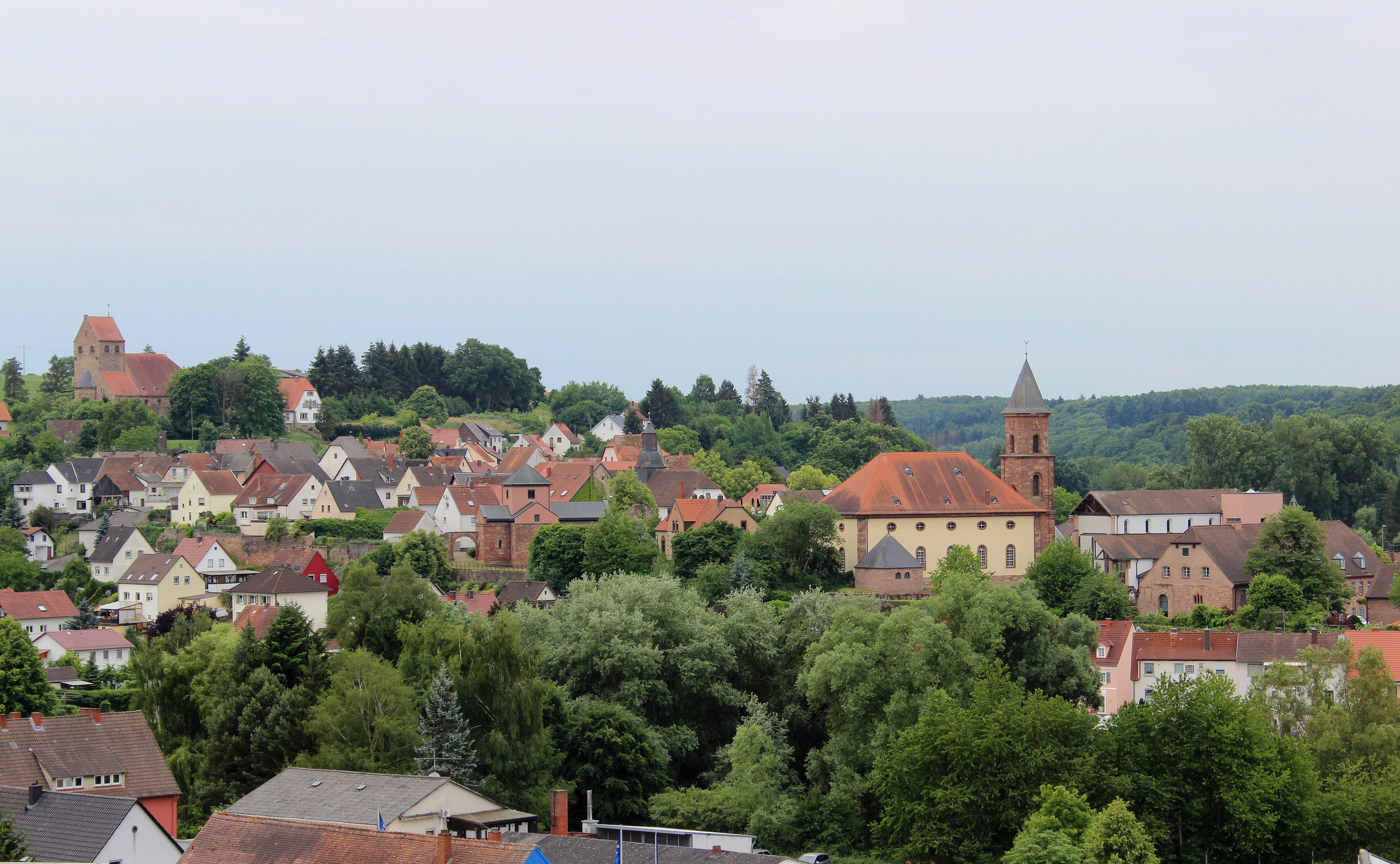 Ansicht der Stadt Hornbach, Landkreis Südwestpfalz, Rheinland-Pfalz